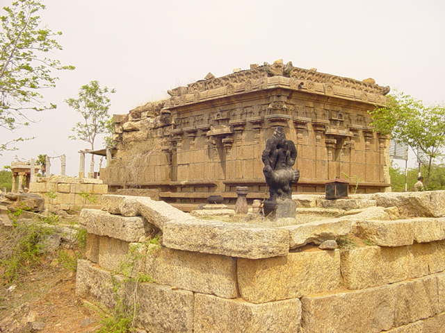 அரிய கல்வெட்டுக்களைத் தன்னகத்தே கொண்ட தர்க்காக்குடி கோயில்